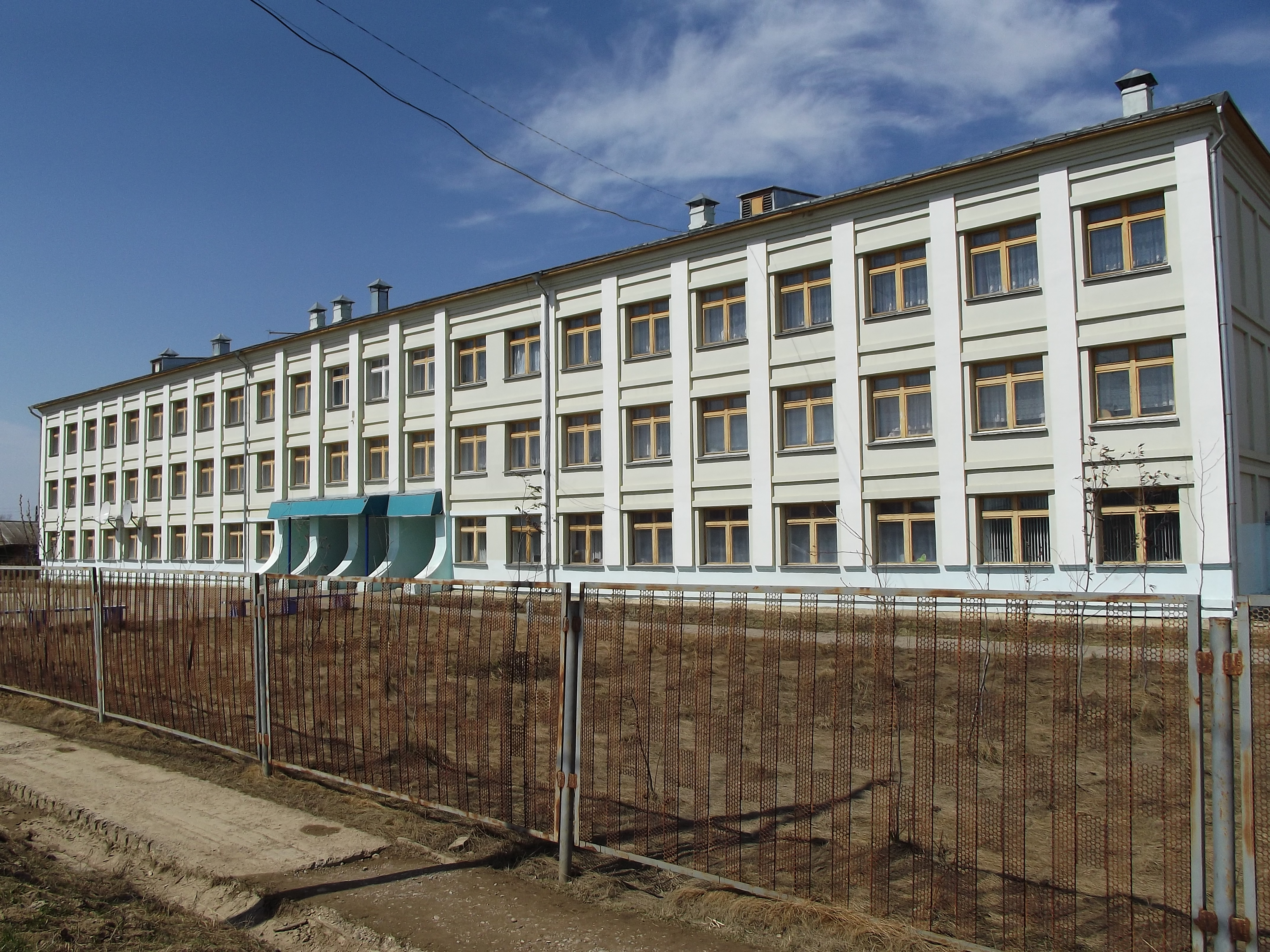 Школа